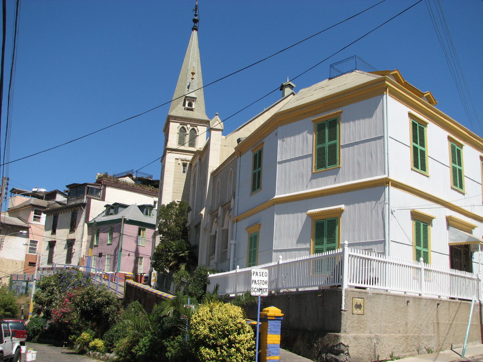 Cerro Concepción à Valparaiso (Chili)